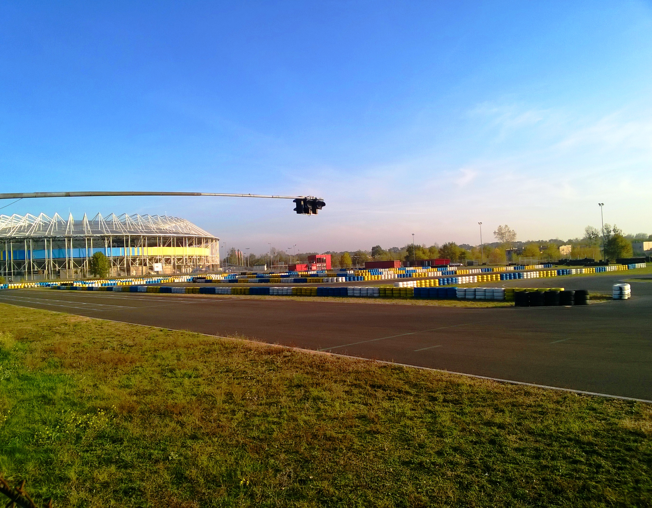 AWIX Racing Arena w Toruniu